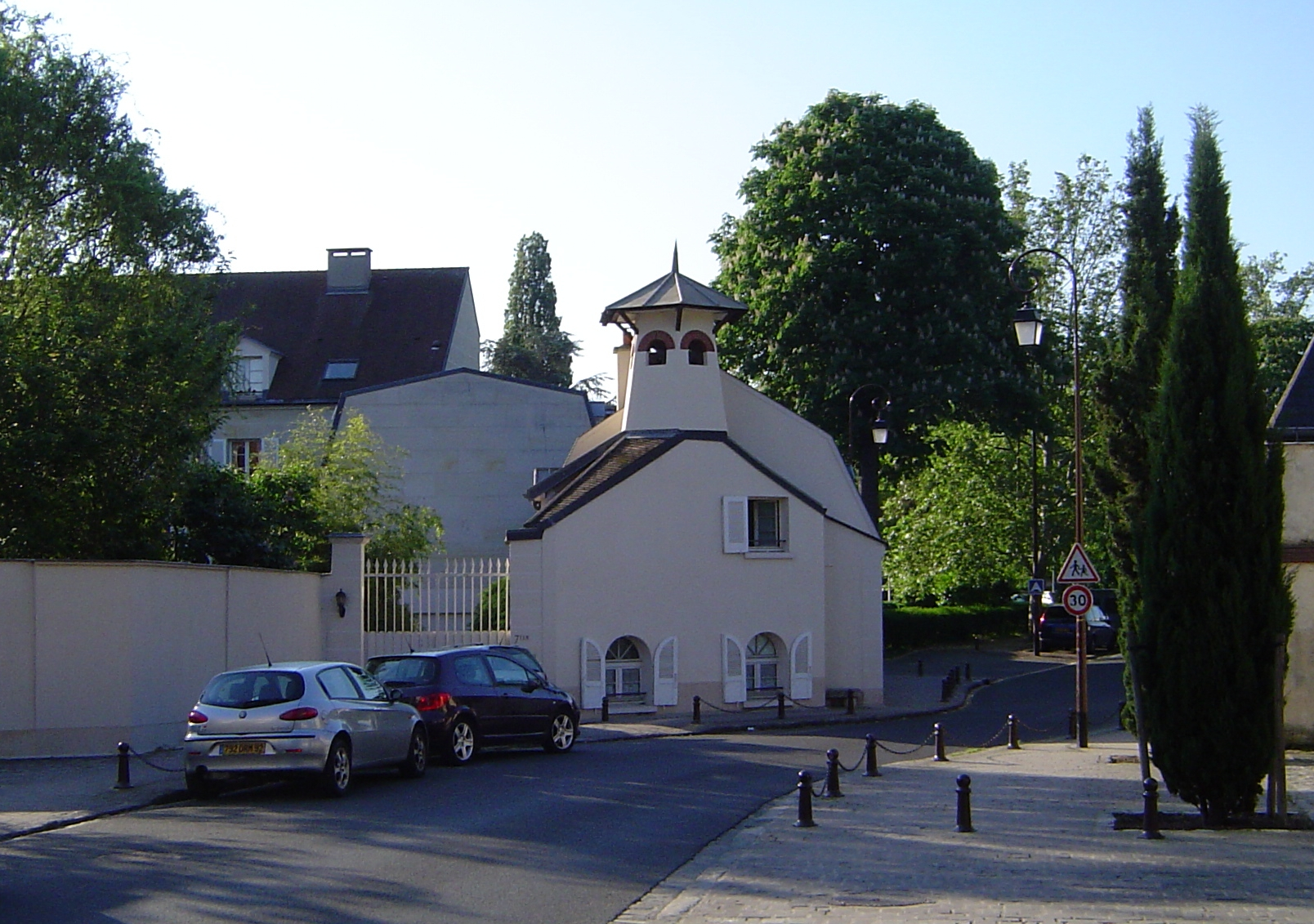 pigeonnier